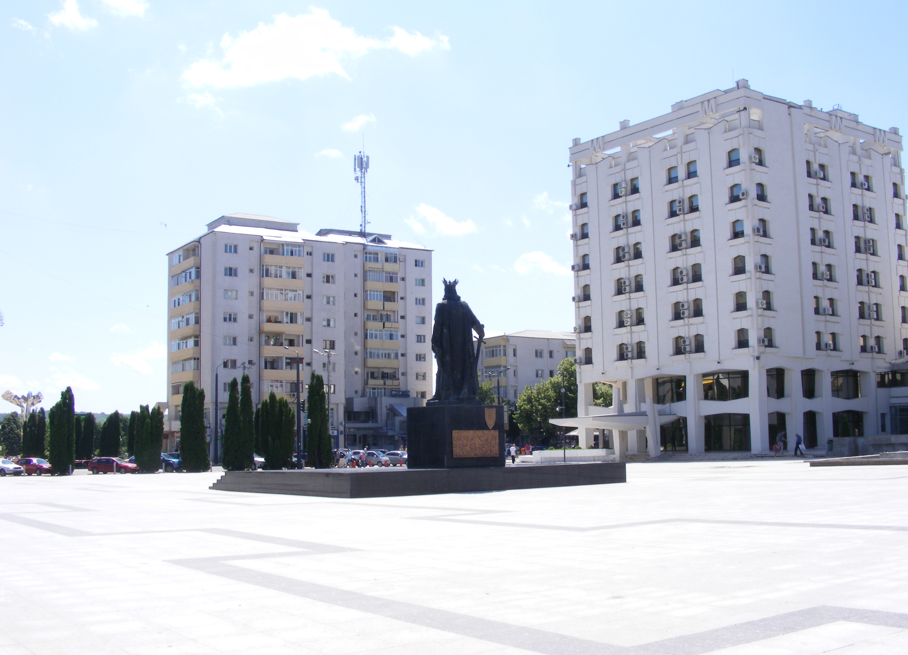 piata civica vaslui